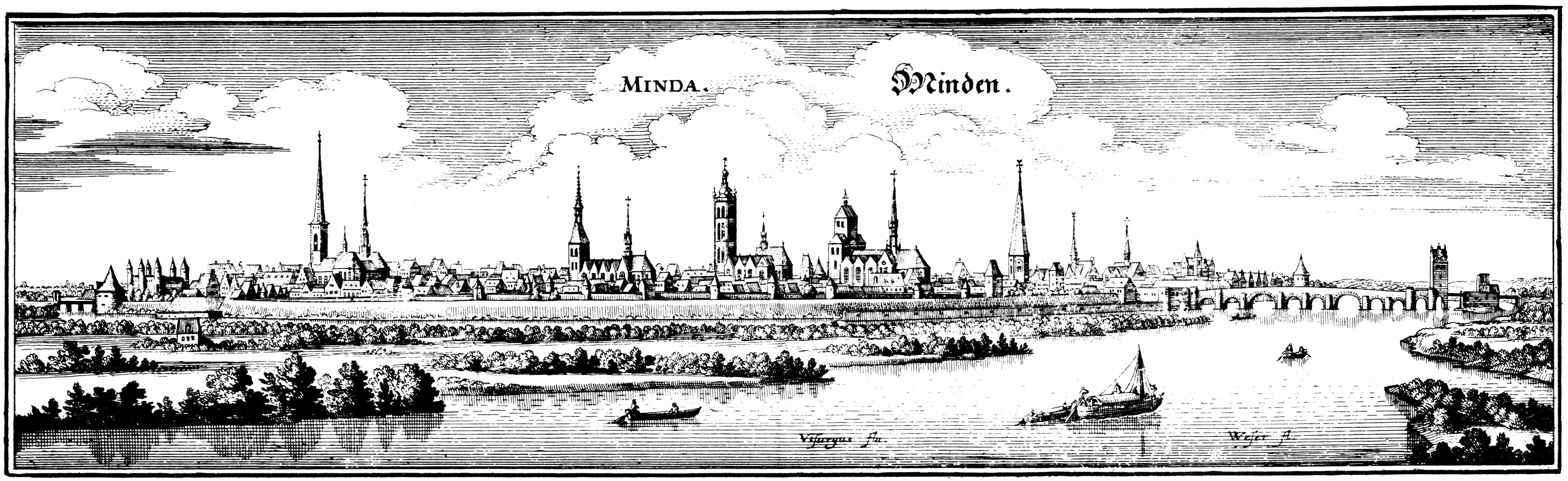 Mittelalterliche Ansicht der Stadt Minden an der Weser, damals eventuell Teil des preußischen Fürstentums Minden oder noch eigenständig als Hochstift Minden, jetzt Nordrhein-Westfalen. Das Zentrum des Stichs bildet in etwa der Dom zu Minden.